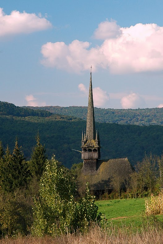 Biserica de lemn din Fodora, Comuna Gîlgău, judetul Salaj este construita in anul 1817 si renovata de doua ori, cel mai recent in 2010.